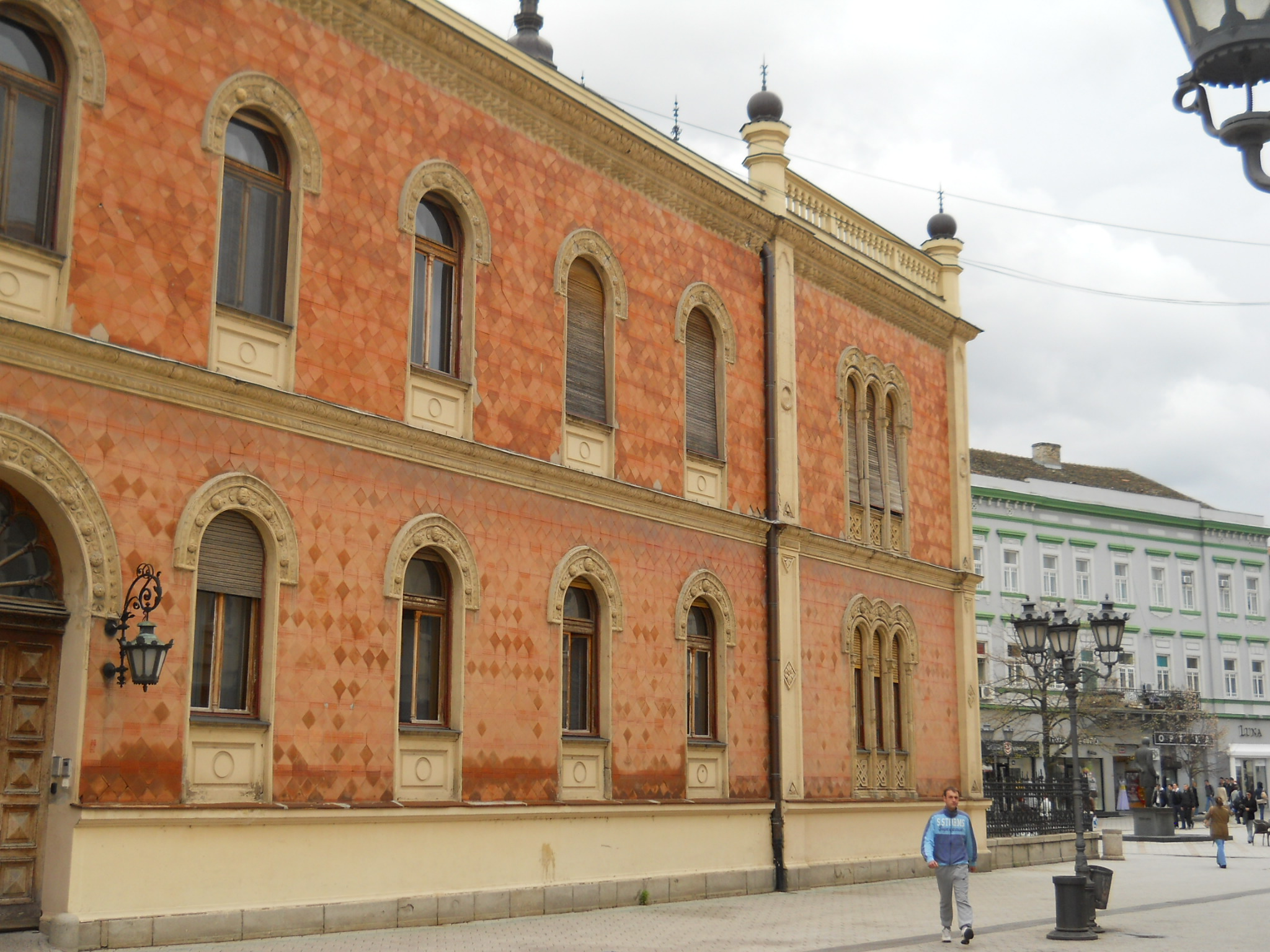 Újvidék - püspöki palota